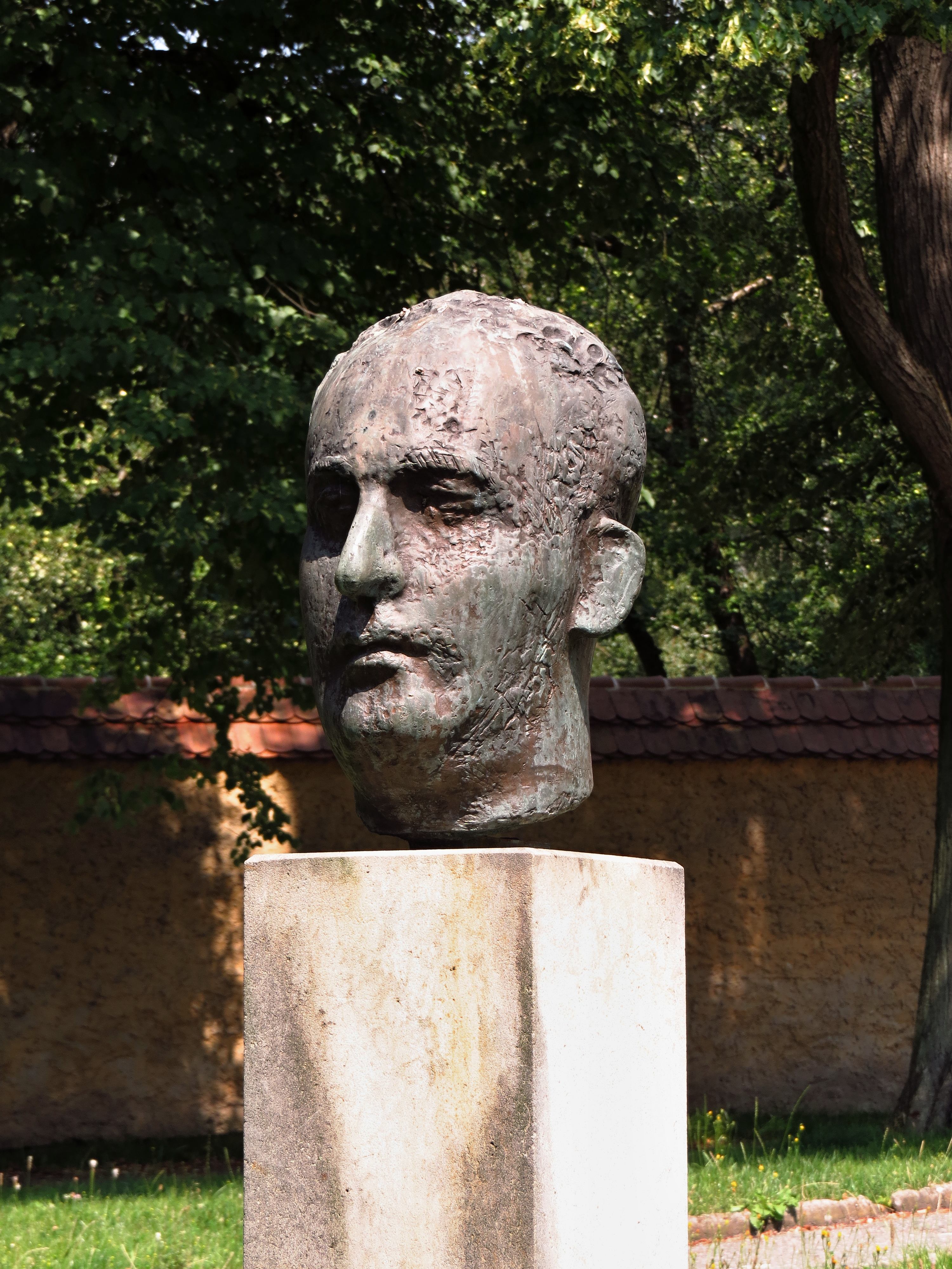 Památník Karla Poláčka - detail busty Project: Chráněná území.